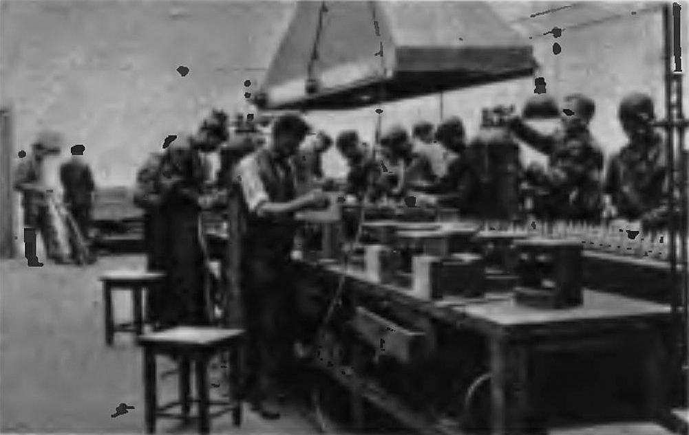 Montownia w Sanockiej Fabryce Akumulatorów (przed 1938).